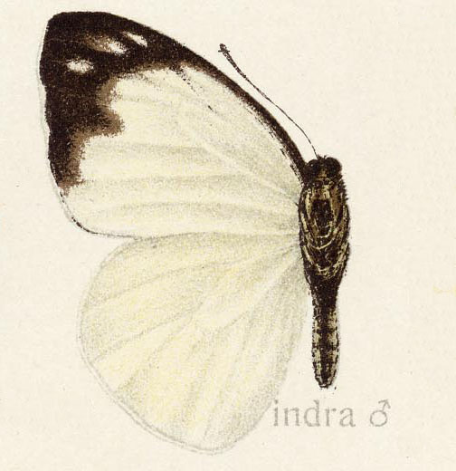 Appias indra